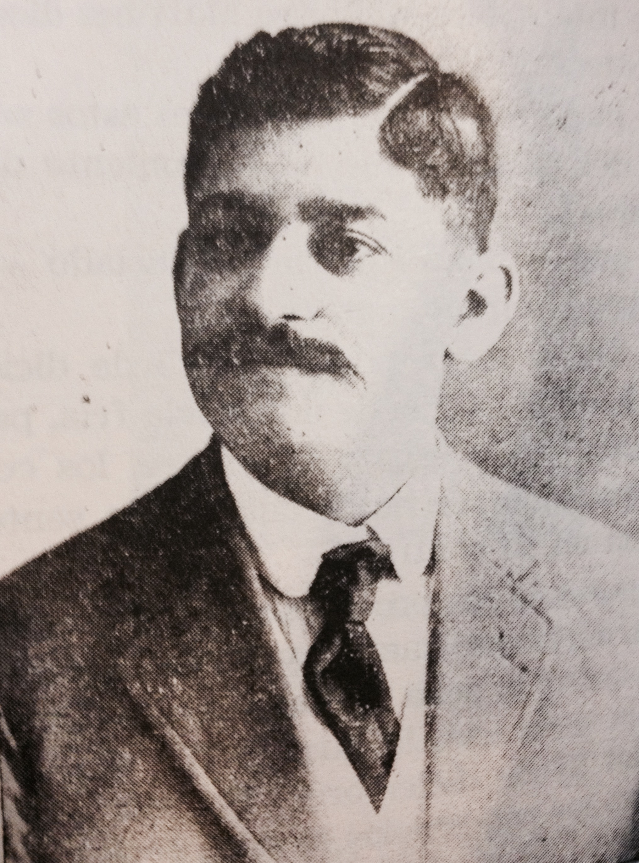 Silverio Ortiz. Líder obrero guatemalteco que luchó contra los gobiernos de Manuel Estrada Cabrera y Jorge Ubico Castaneda. Foto de 1920.